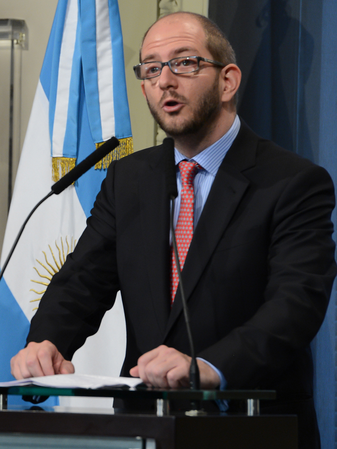 El ministro de Producción, Francisco Cabrera, y el secretario de Comercio, Miguel Braun, ofrecieron esta mañana una conferencia de prensa en Casa Rosada sobre los objetivos que tendrá la nueva Comisión Nacional de Defensa de la Competencia (CNDC), entre los que se enumeran la defensa de los consumidores y las pymes, la prevención e identificación de conductas monopólicas y anticompetitivas, y los abusos de las posiciones dominantes.